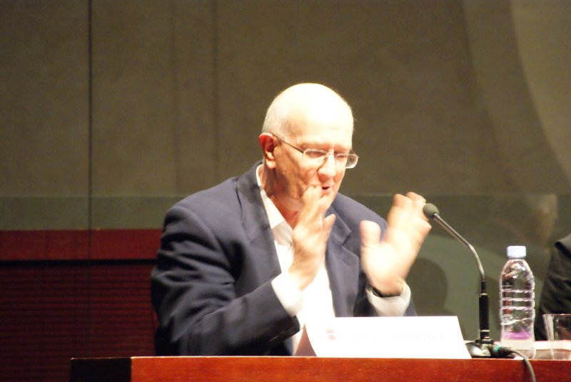 Marcel Gauchet - conférence au collège des Bernardins du 27 janvier 2011 : pédagogie et pédagogisme, le sens d'un débat